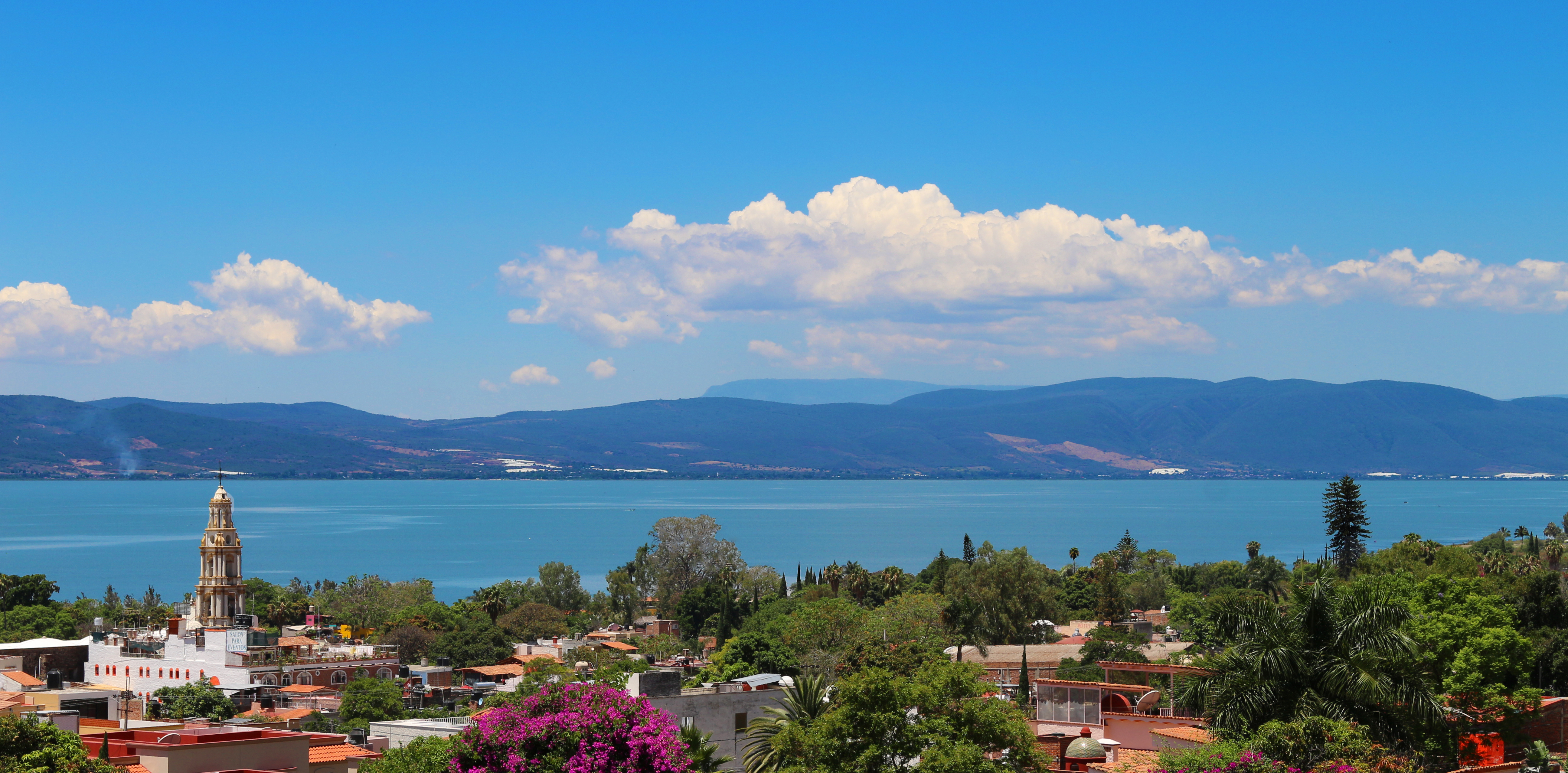 Vista del Lago De Chapala y Ajijic